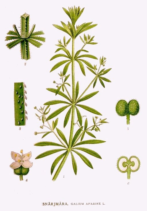 Original Description Snärjmåra, Galium aparine L.